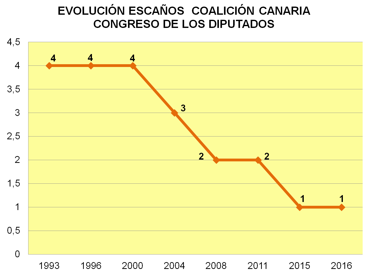 Evolución de los escaños de Coalición Canaria en el Congreso de los Diputados.